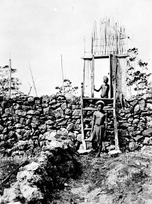 Repronegatief. Ingang van een fort te Lawawang, Babar-eilanden